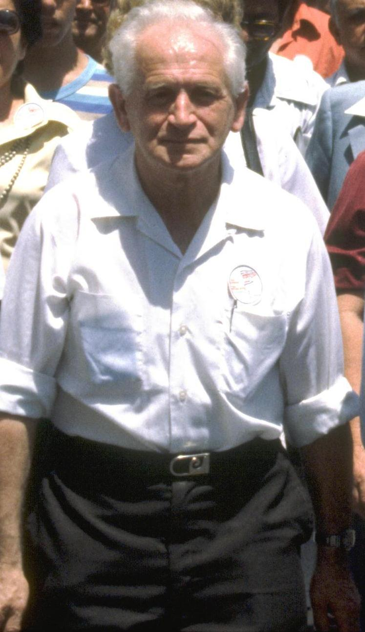 ח"כ מאיר תלמי בהפגנת ההסתדרות לרגל ה-1 במאי, חג הפועלים, ברחובות העיר תל אביב.